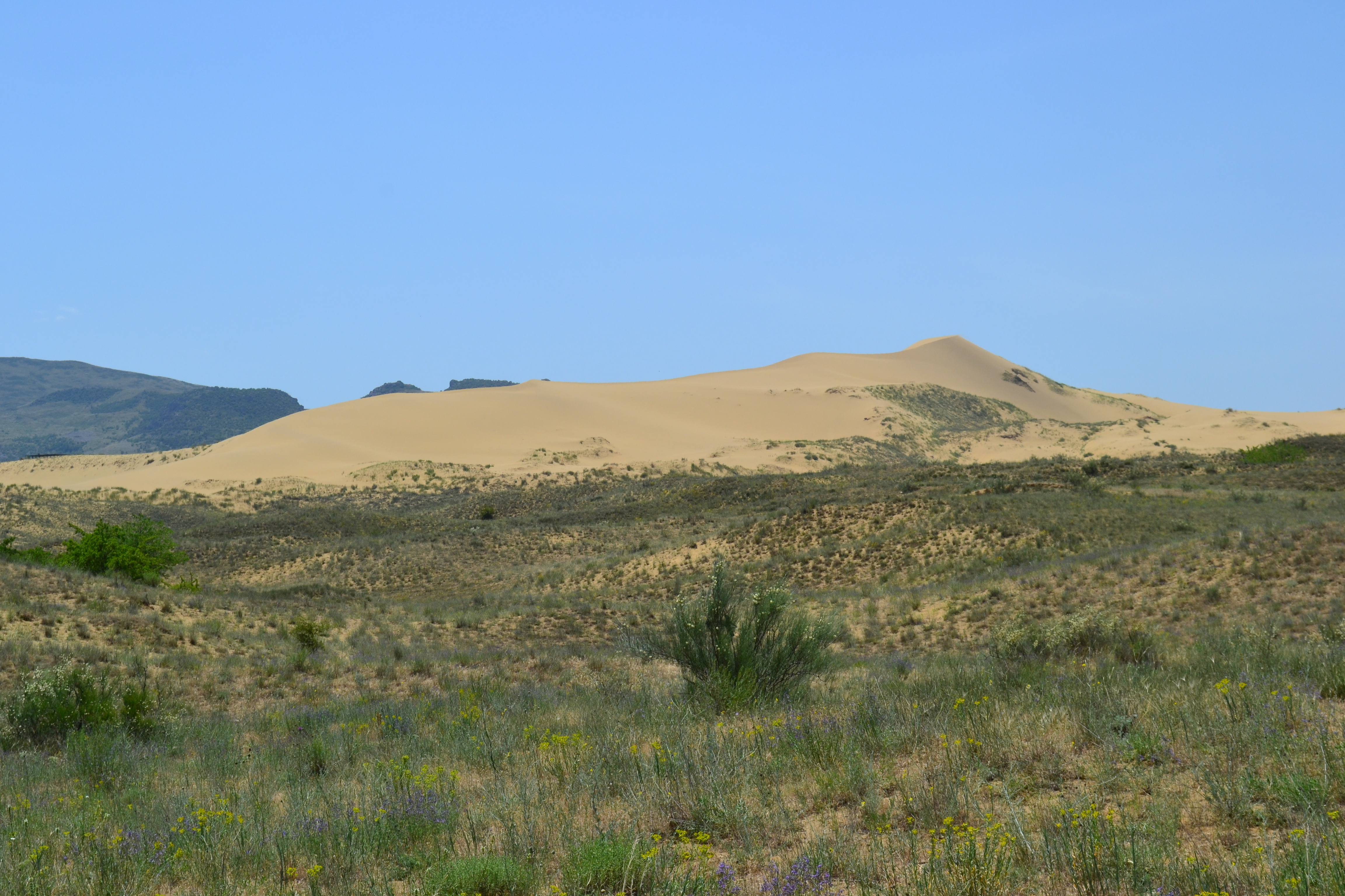 Песчаный бархан Сары-Кум: на территории государственного природного заповедника 'Дагестанский', Кумторкалинский район, Дагестан This image is related to the protected area of Russia number 0510023